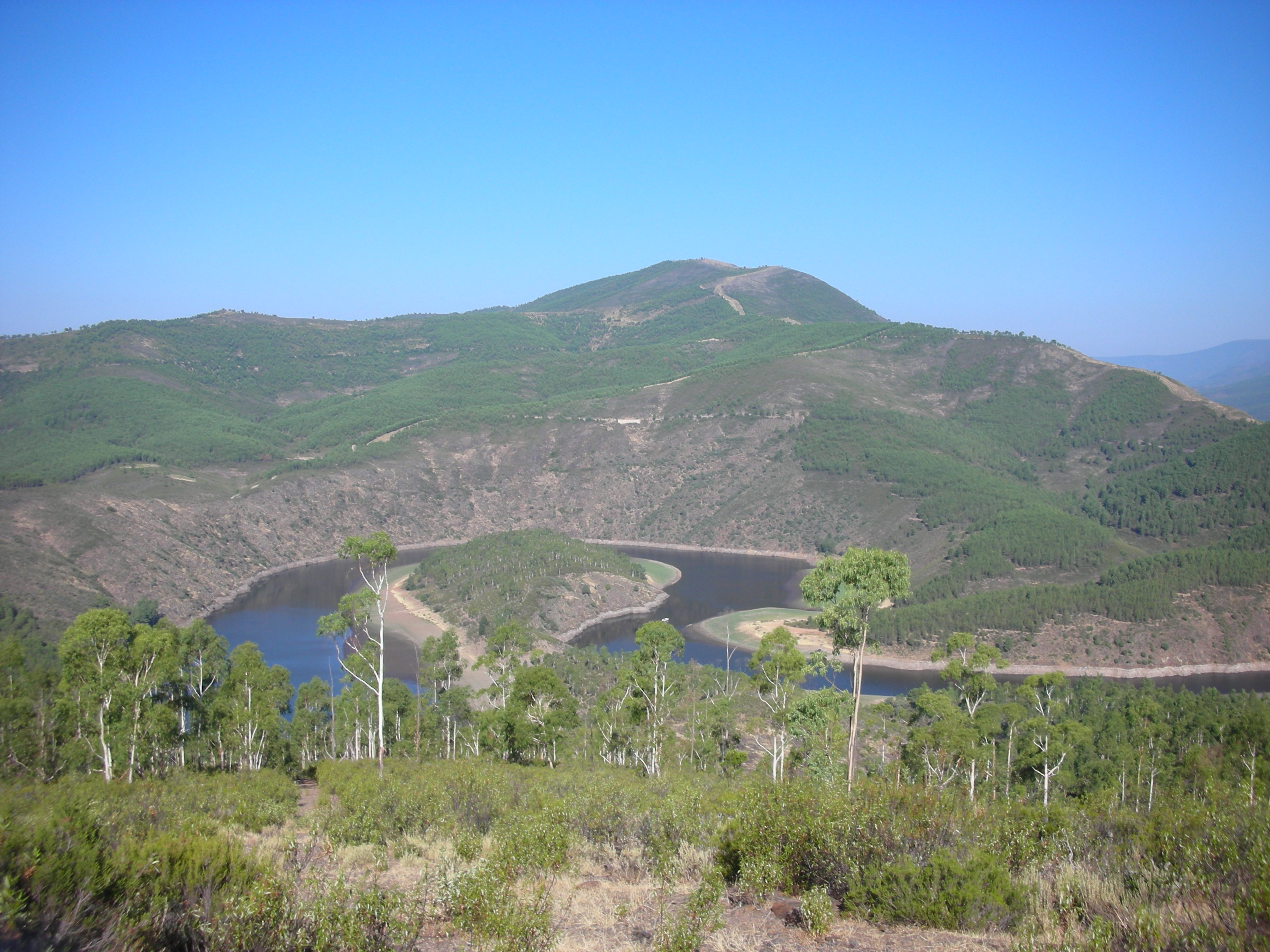 Vue inversée de la Isla sur la commune de Sotoserrano en Espagne